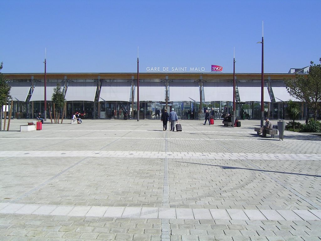 Nouvelle Gare (SNCF et routière) Photo personnelle (own work) de Marianna